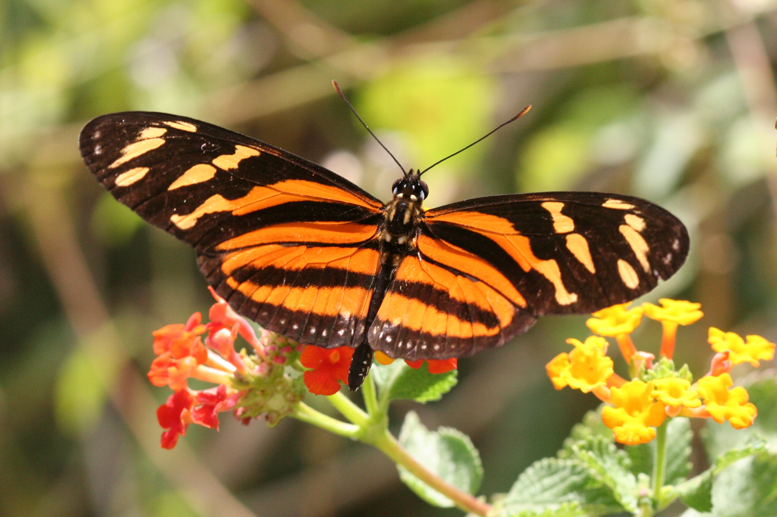 Isabella's Heliconian (Eueides isabella)